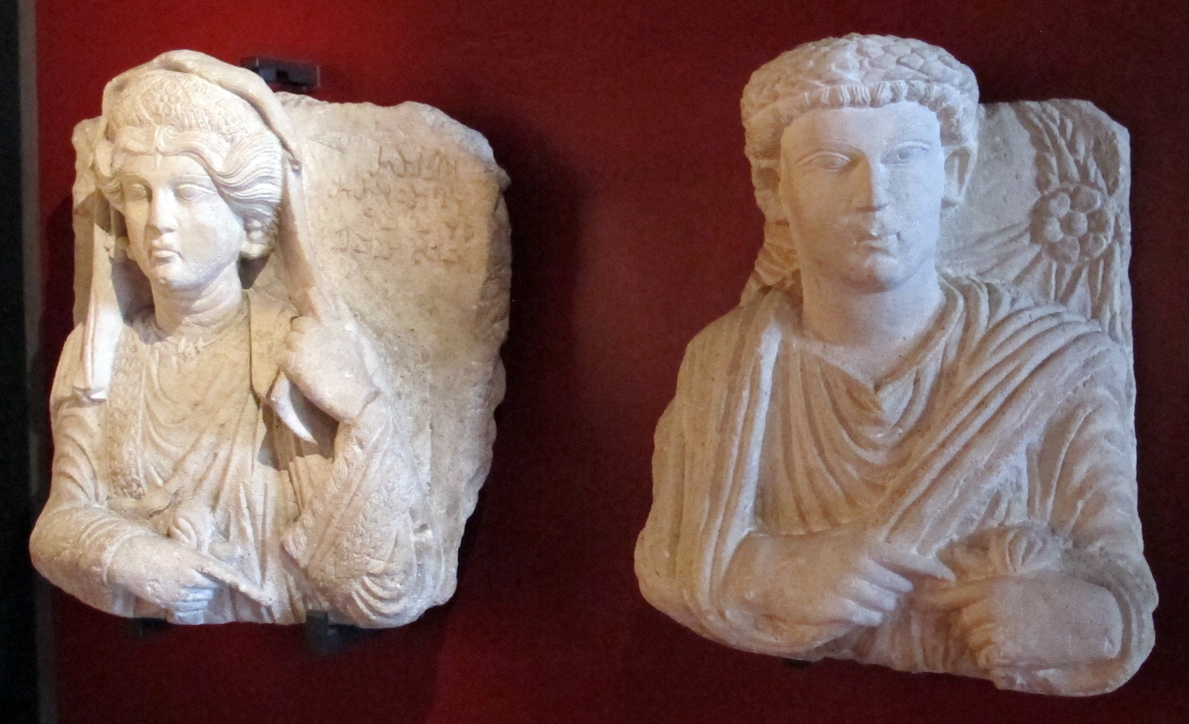 Museo Gregoriano Egizio